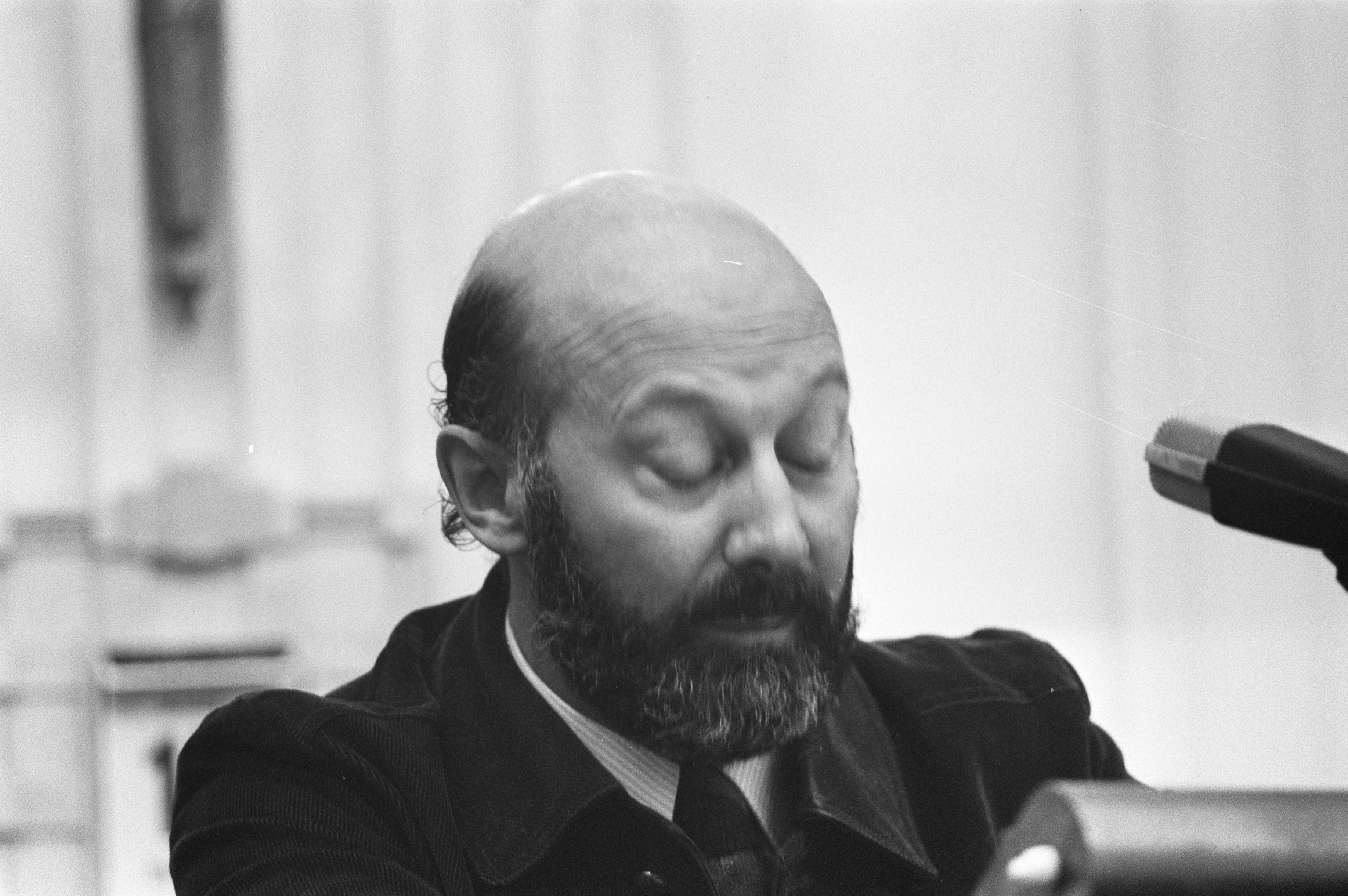 Collectie / Archief : Fotocollectie Anefo Reportage / Serie : [ onbekend ] Beschrijving : Debat over verhoging schoolgelden in de Tweede Kamer, C. Laban (PvdA) Datum : 17 oktober 1972 Locatie : Den Haag, Zuid-Holland Trefwoorden : lesgelden, parlementaire debatten, politiek, portretten Persoonsnaam : Laban, C. Instellingsnaam : PvdA, Tweede Kamer Fotograaf : Mieremet, Rob / Anefo Auteursrechthebbende : Nationaal Archief Materiaalsoort : Negatief (zwart/wit) Nummer archiefinventaris : bekijk toegang 2.24.01.05 Bestanddeelnummer : 925-9552